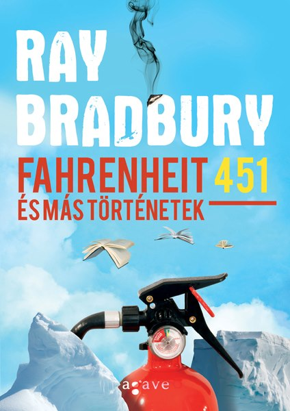 Ray Bradbury Fahrenheit 451 című könyvének borítója, magyar kiadás